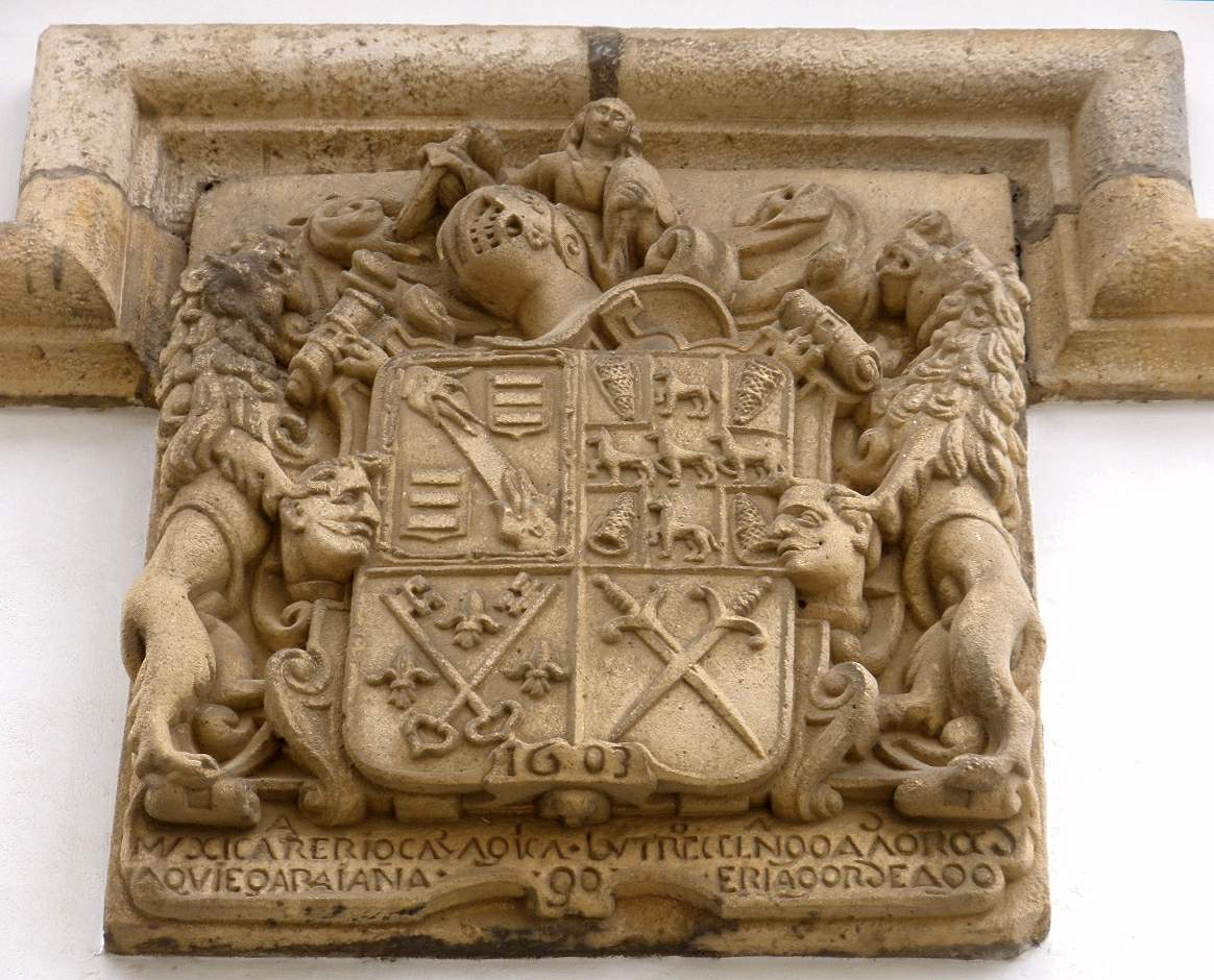 Palacio Torrebarri (Plentzia)